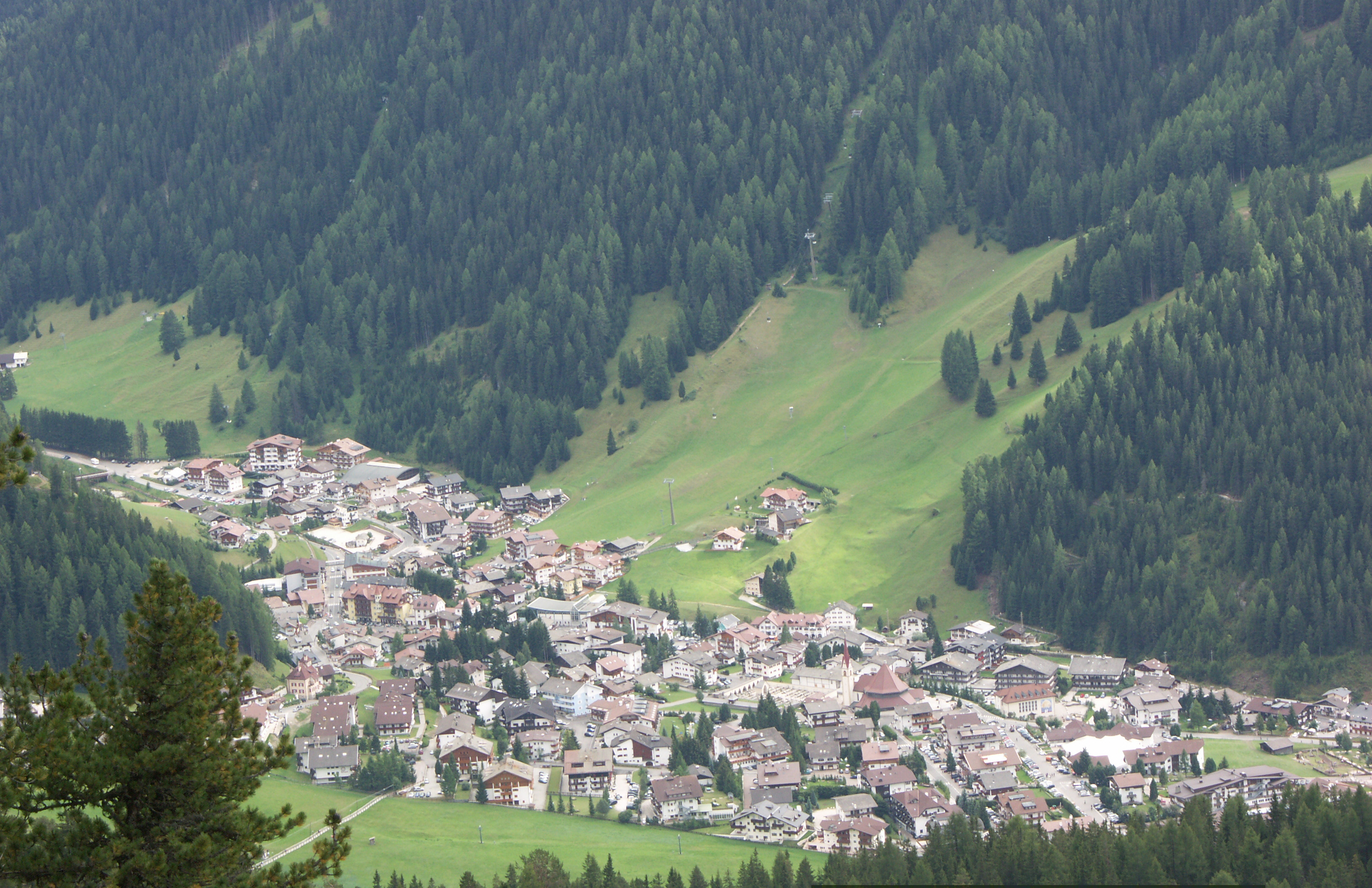 Wolkenstein, Ortszentrum vom Aufstieg auf die Stevia gesehen